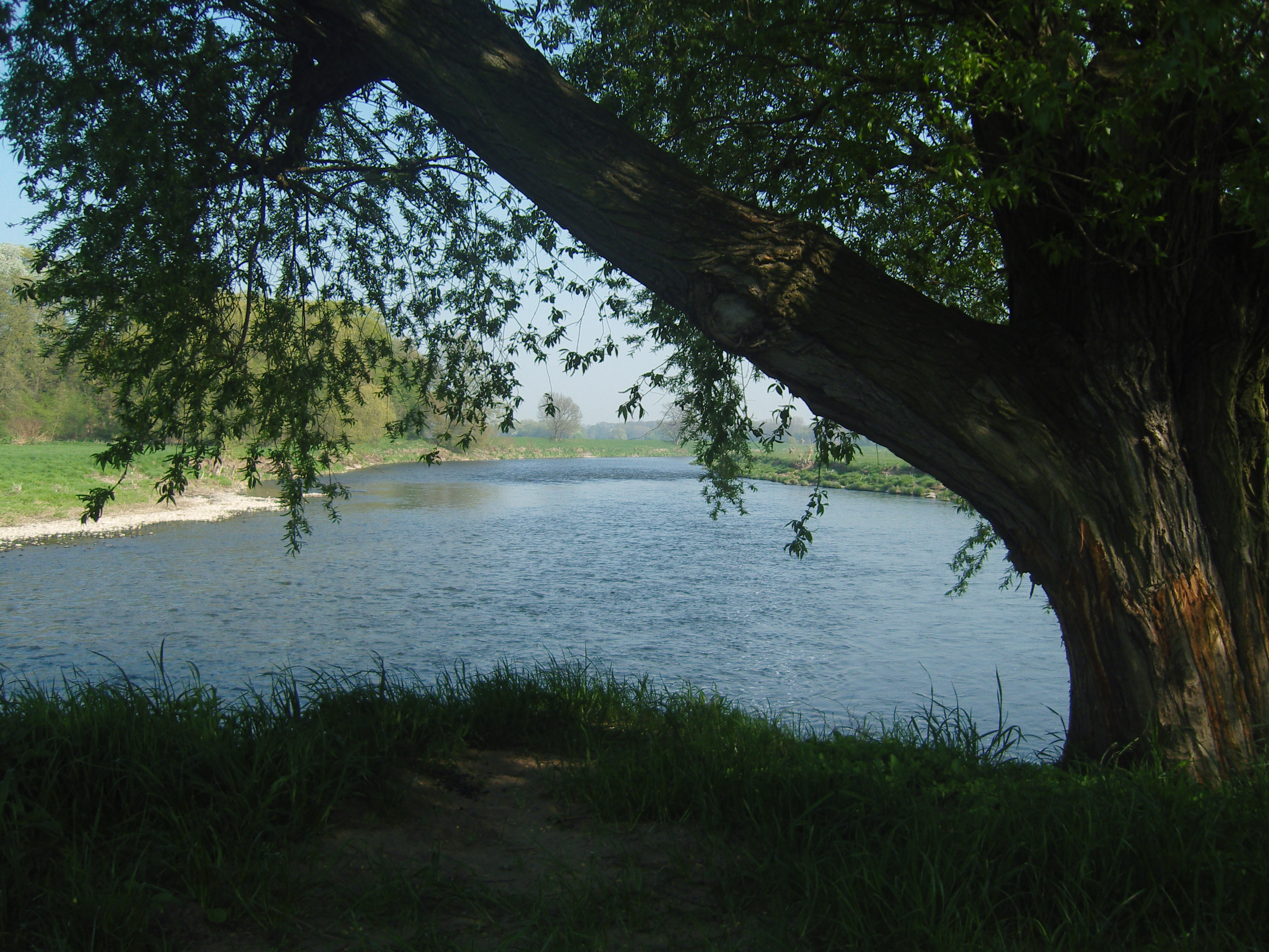 Zusammenfluss von Zwickauer und Freiberger Mulde zur Mulde